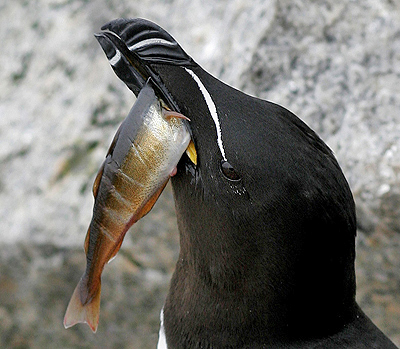 Alke, Alca torda, razor-billed auk, razor-bill.